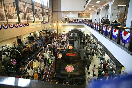 交通博物館 中央ホール（2006/05/03）